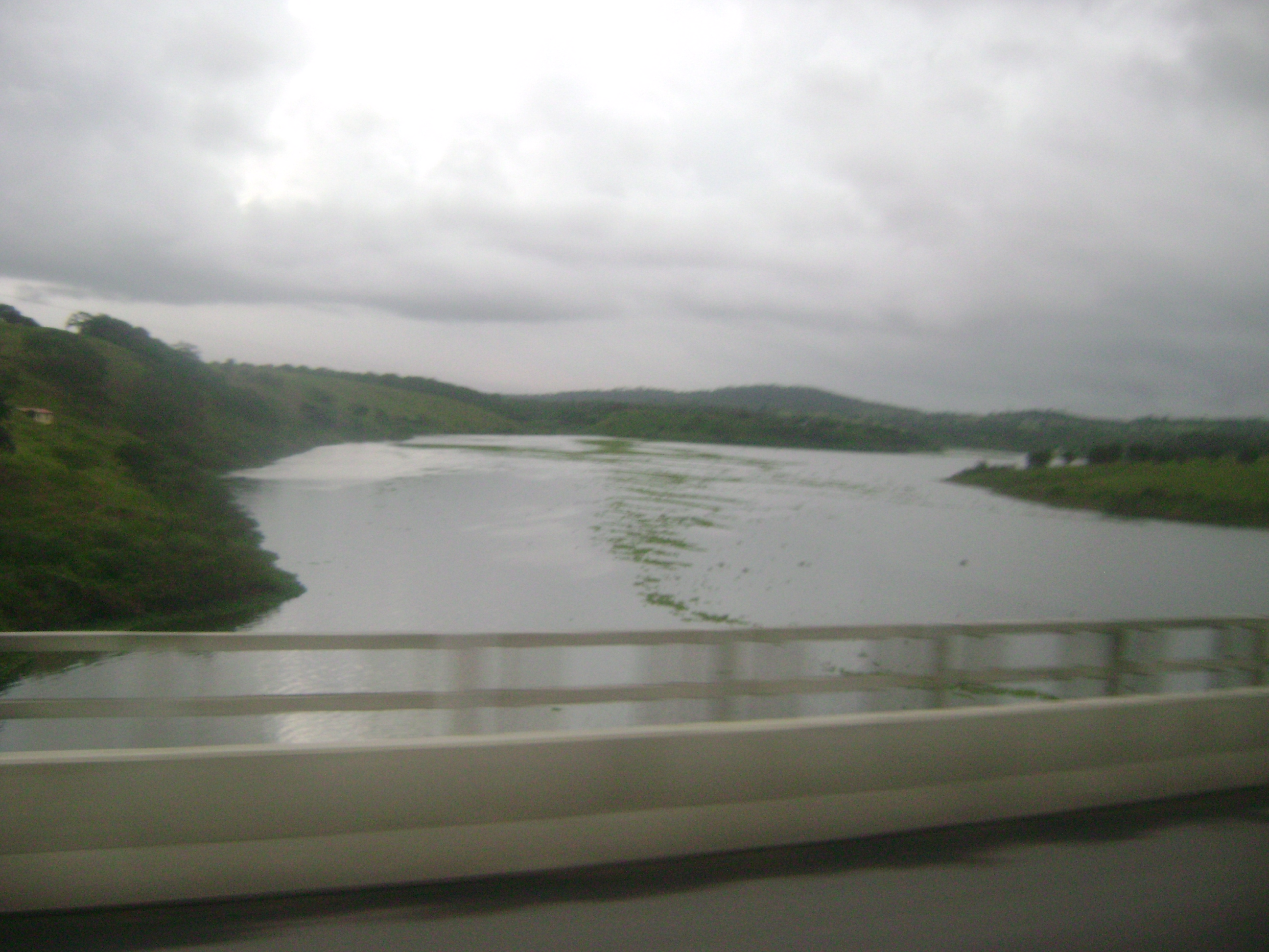 Rio Jacuípe na entrada de Feira de Santana, Bahia, Brasil.